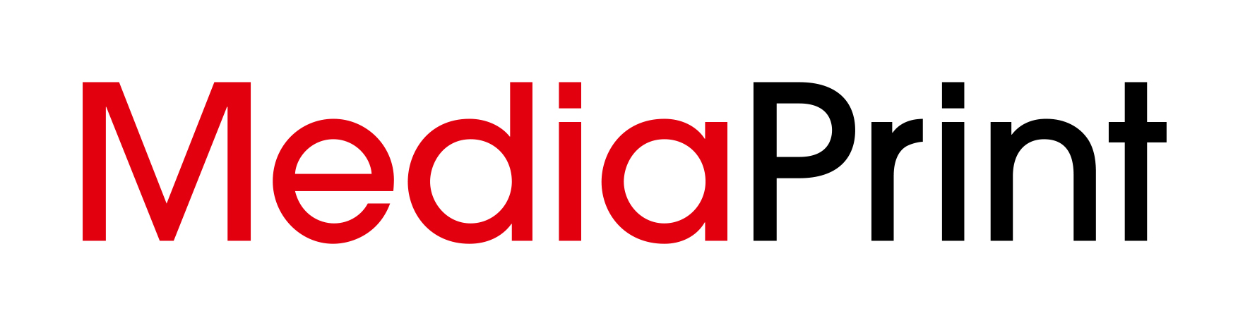 Mediaprint.at / Logo